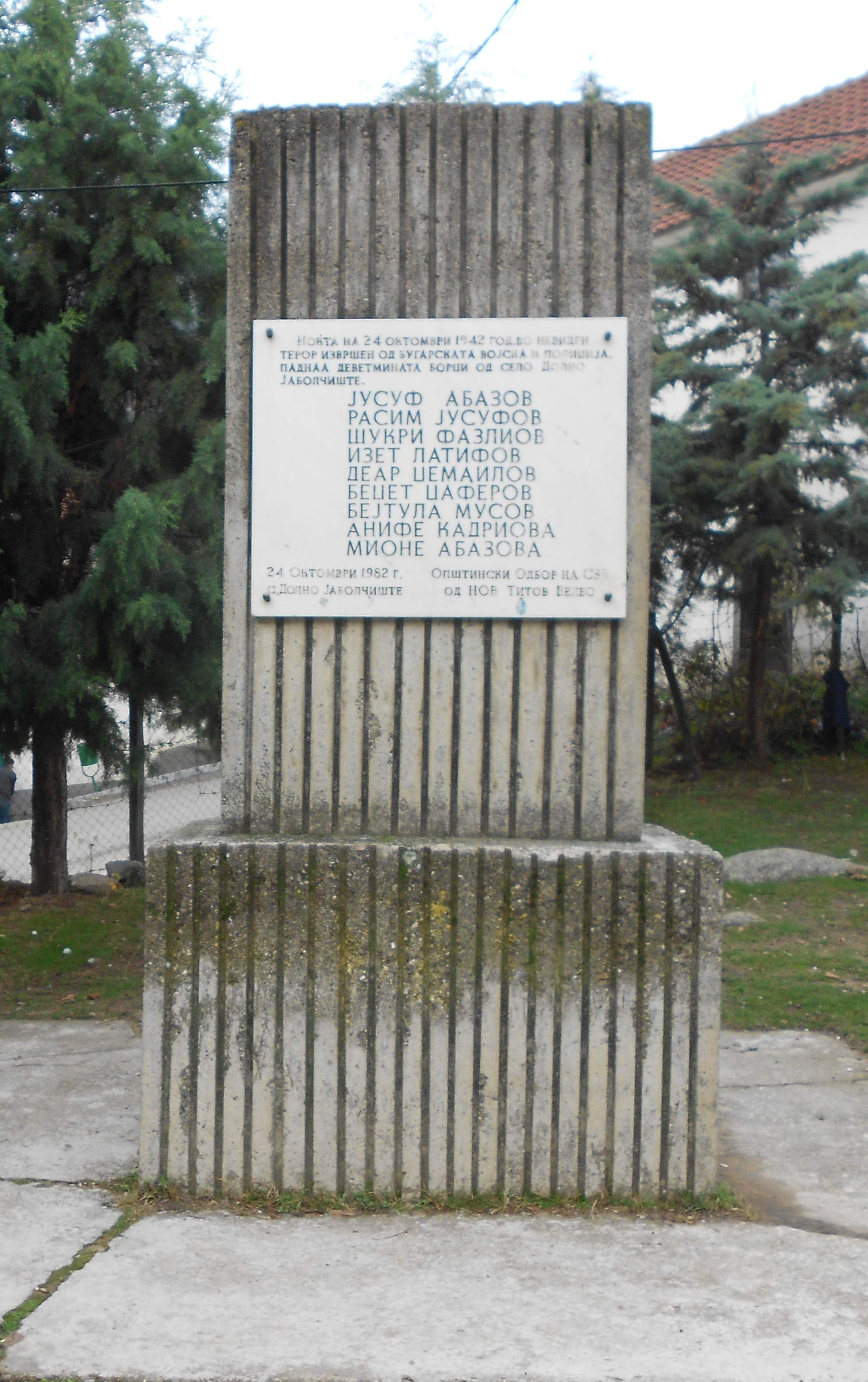 Новиот споменик во Долно Јаболчиште